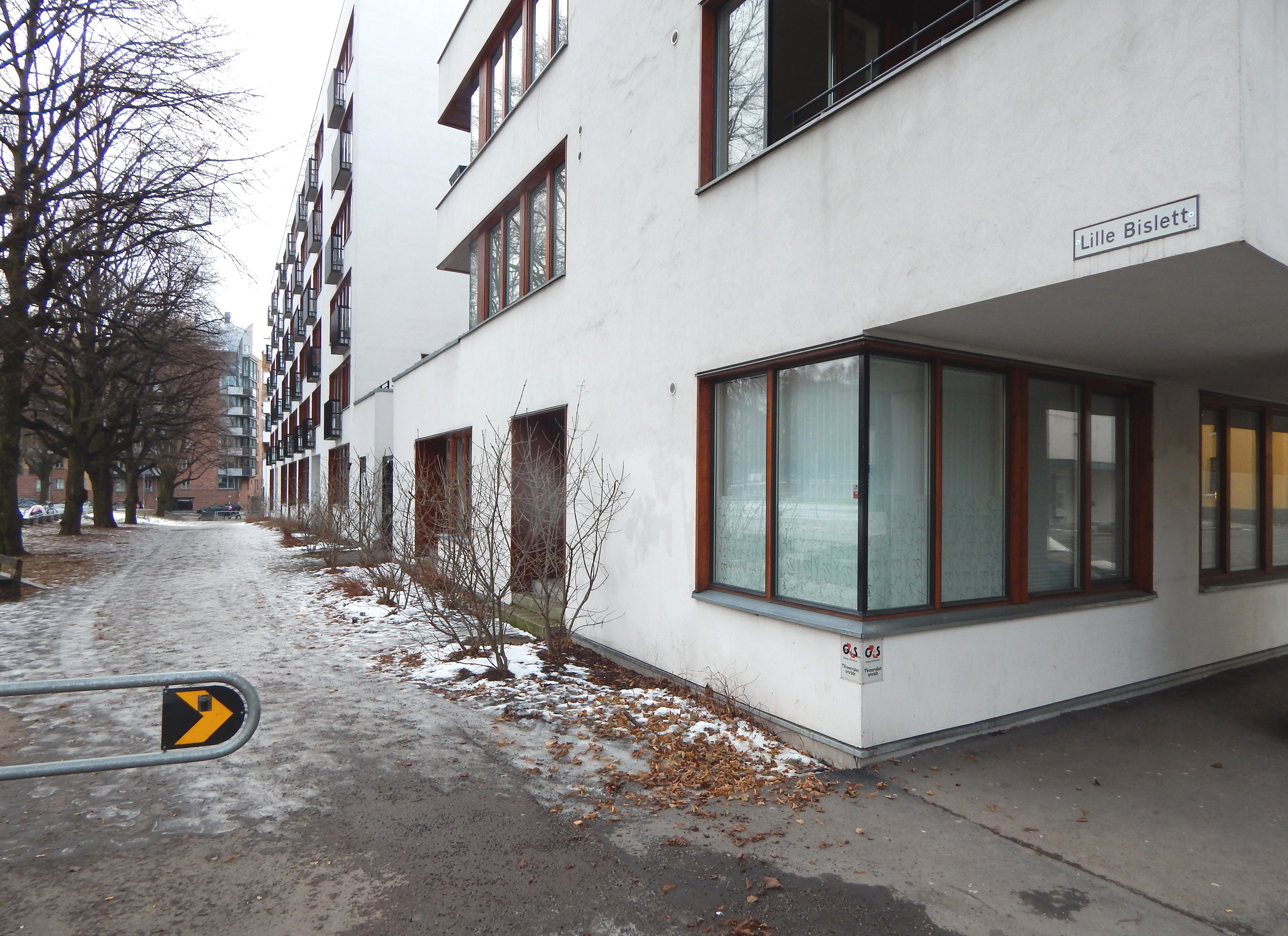 Lille Bislett ved Bislett i Oslo